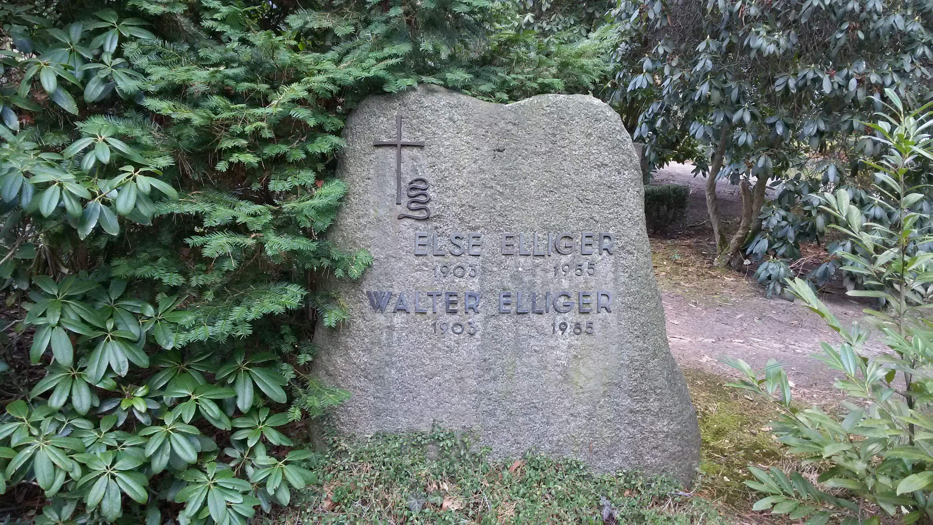 Grabstein des Theologen und Kirchenhistorikers Walter Elliger auf dem Waldfriedhof Kleinmachnow in Kleinmachnow bei Berlin